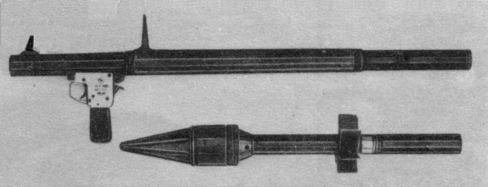 RPG-2 and PG-2 grenade